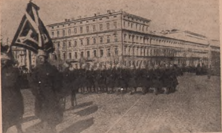 Дефіляда Синьої дивізії після прибуття у Київ. Квітень .9 1 8 р